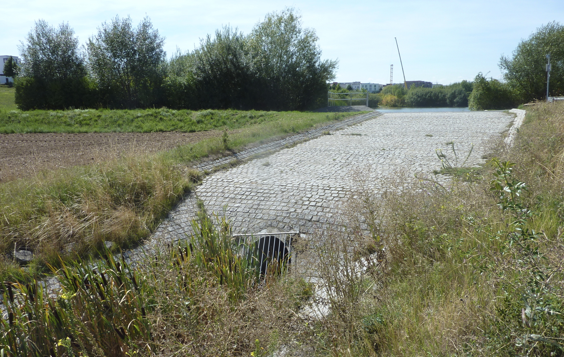 Der Kätcheslachpark ist eine Grünanlage im Stadtteil Kalbach-Riedberg der Stadt Frankfurt am Main. Der Park mit zentralem Teich, Regenwasser-Rückhaltebecken sowie mehreren Zu- und Ablaufgräben wurde von 2006 bis 2007 in einer Mulde der Anhöhe Riedberg angelegt. Sein Hauptzweck ist die Gewässerregulierung der benachbarten, zur selben Zeit neu angelegten Wohnsiedlung. Das Foto zeigt ein Drosselbauwerk, das am östlichen Teichufer dem Entwässerungsgraben Kätcheslache (Zufluss des Nidda-Nebenflusses Kalbach) vorgeschaltet ist